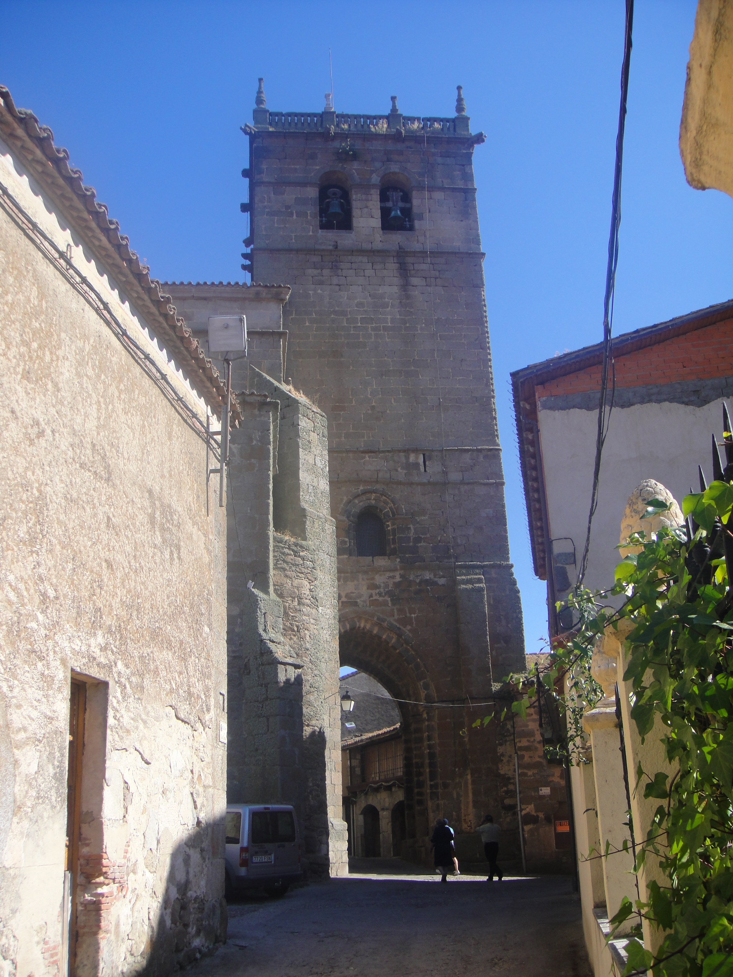 Torre de la iglesia de Sta. María la Mayor de Ledesma, provincia de Salamanca, (España).